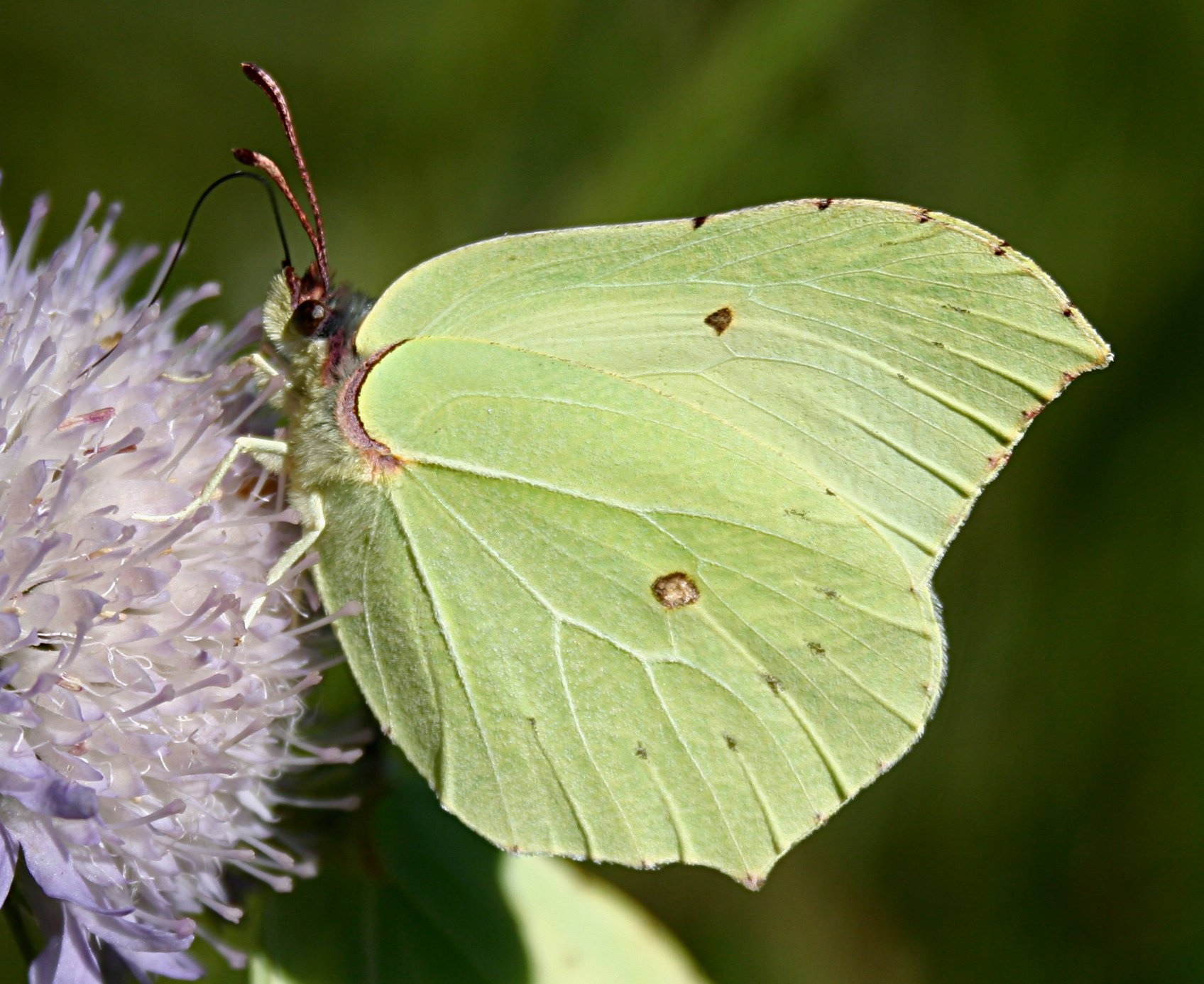 Gonepteryx rhamni